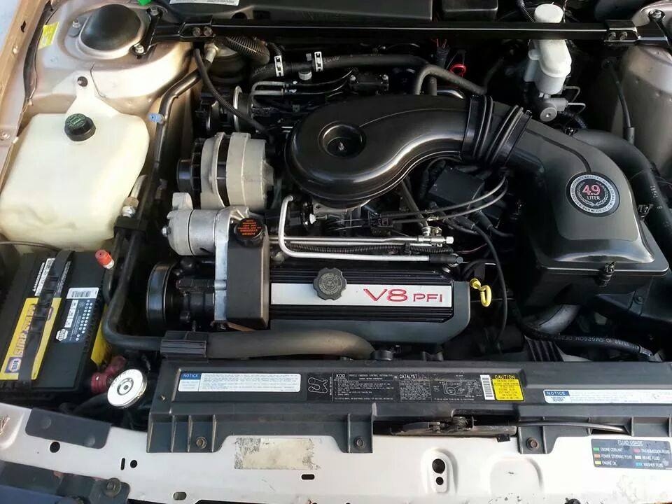 Cadillac 4.9 Liter V8 engine from 1992 Sedan Deville